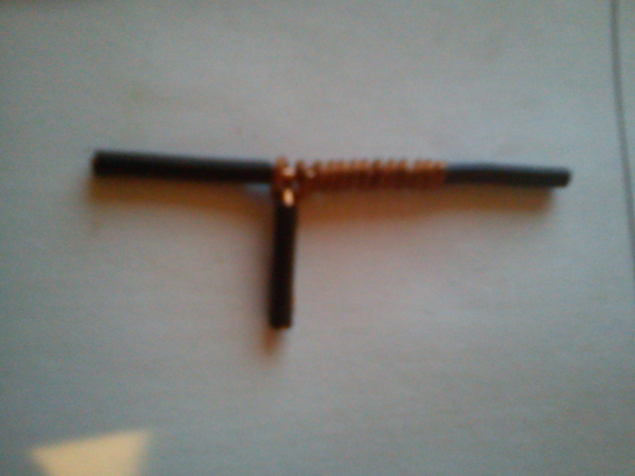 Empalme eléctrico hecho con cable alambre.